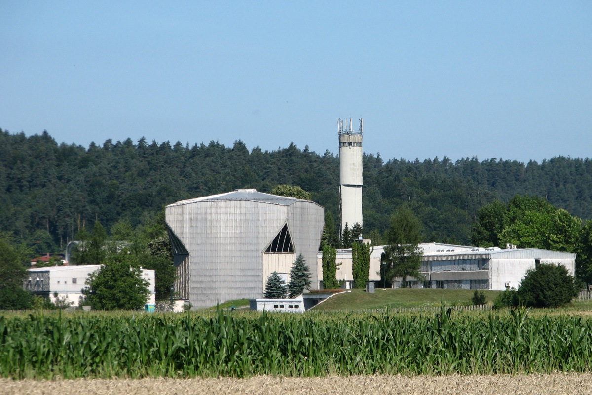 Reaktorski center Podgorica, Brinje, slikano s polja